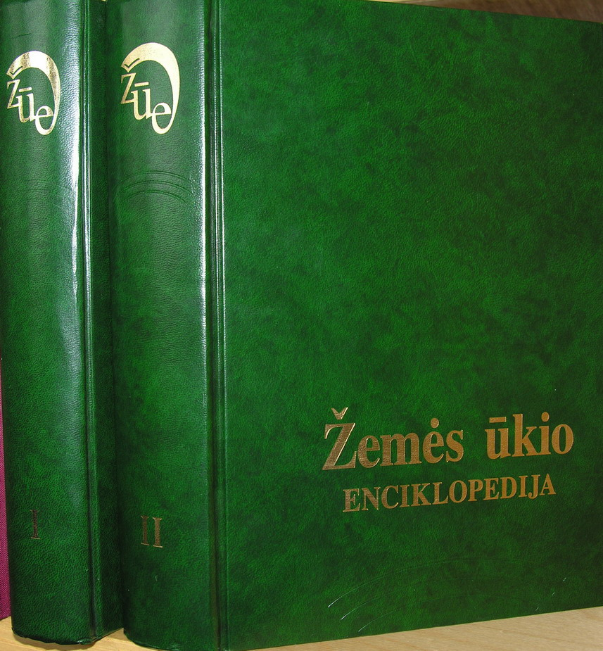 Žemės ūkio enciklopedija Fotografavo: Algirdas, 2006 m. gegužės 3 d.